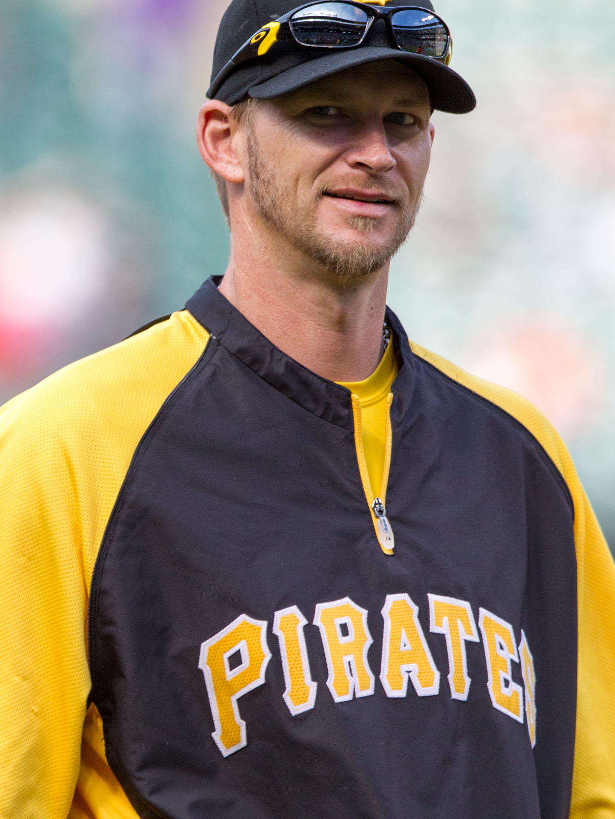 A. J. Burnett